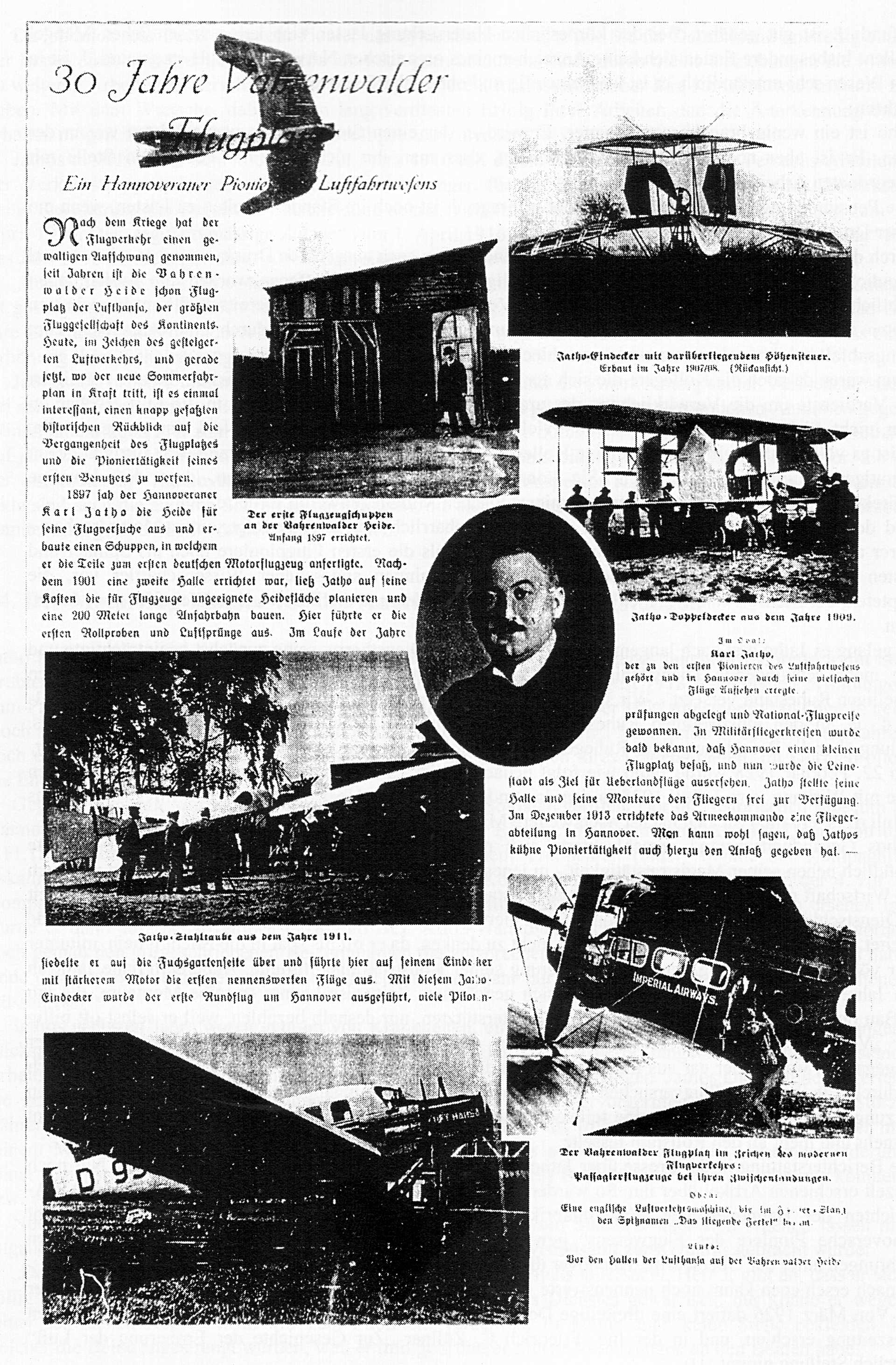 Hannoverscher Anzeiger, Beilage 'Illustrirte Zeitung' über den Flugplatz Vahrenwald. 30 Jahre Vahrenwalder Flugplatz. Das Bild oben rechts zeigt den Jatho Zweiflächer von 1907/1908